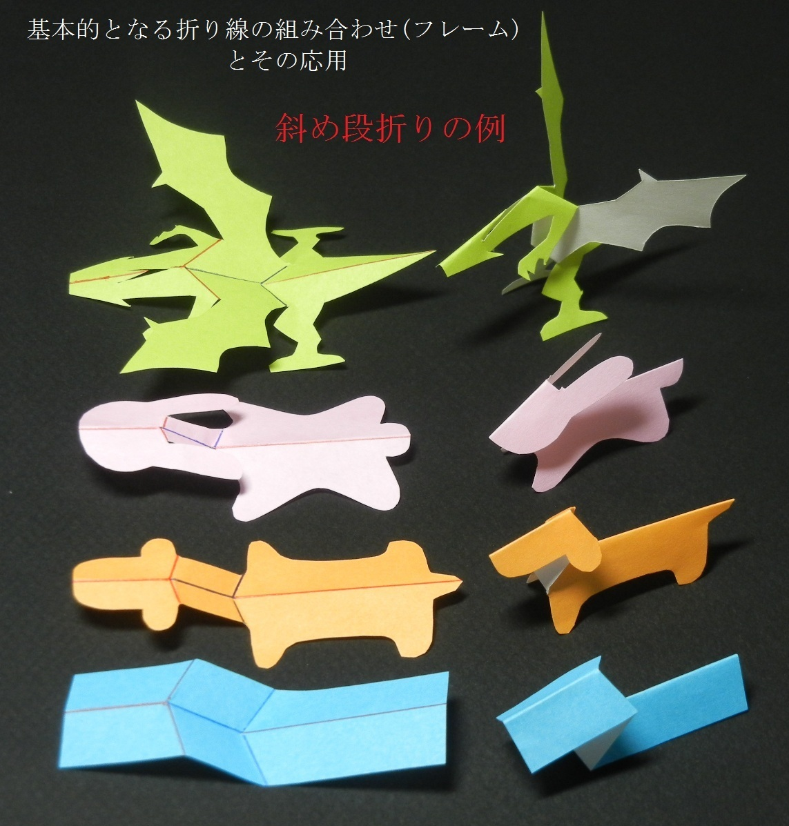 Artistry of oblique crimp fold